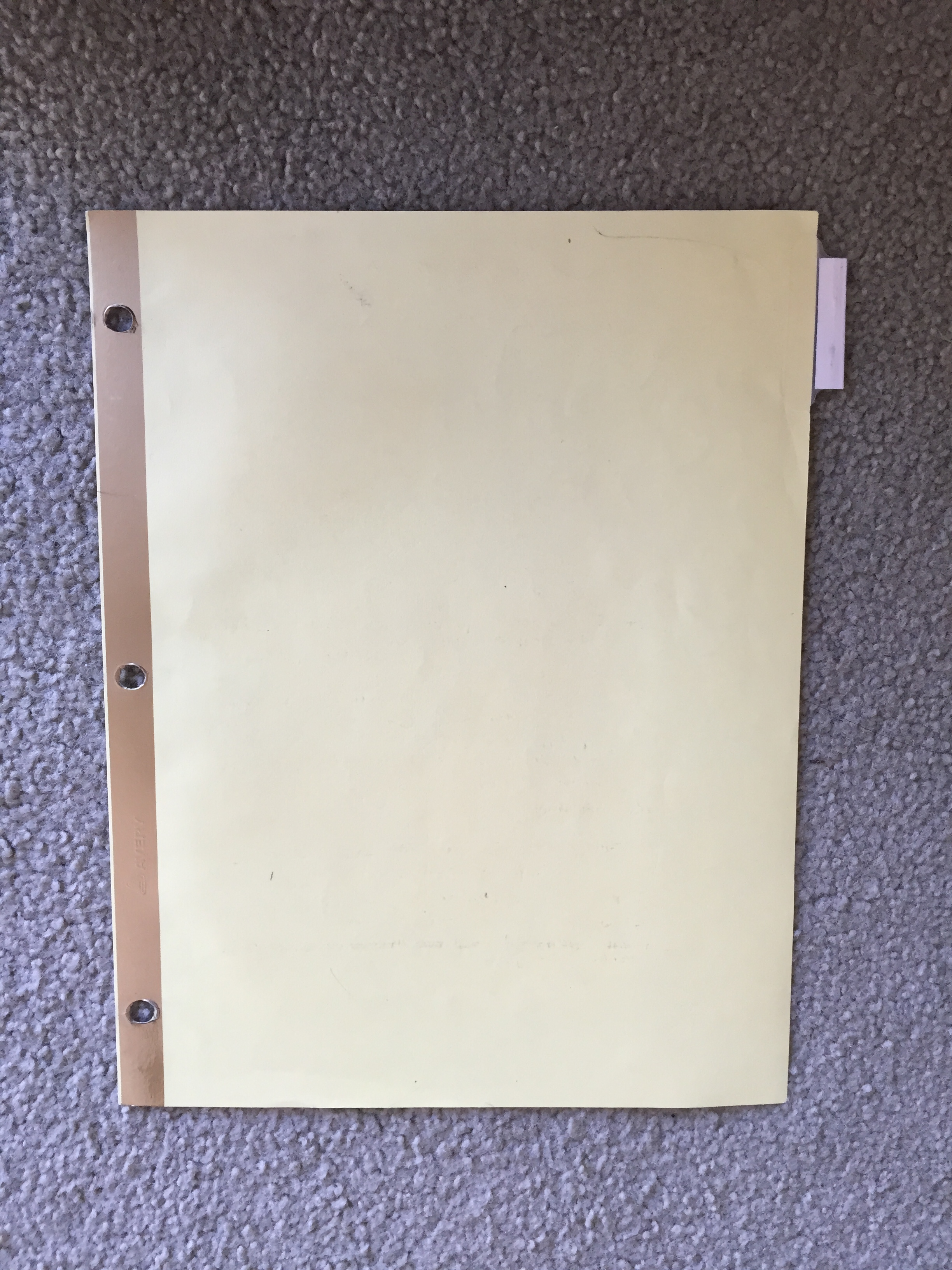 Binder Separator